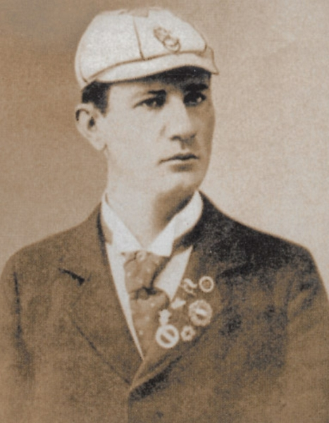 Portrét – Paul Neumann (1875 - 1932), Rakouský plavec a lékař.